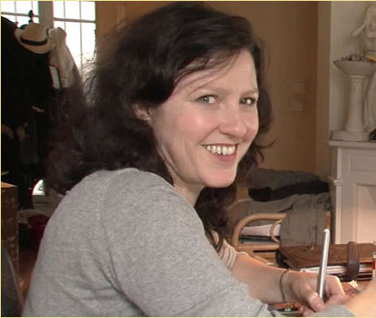 Hélène Giraud 2014